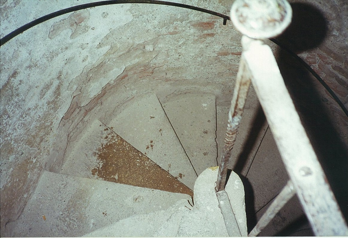 Wendeltreppe mit Spindel - Spindeltreppe in Laxenburg_Kirche